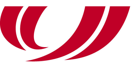 Logo de la Unió de Federacions Esportives de Catalunya